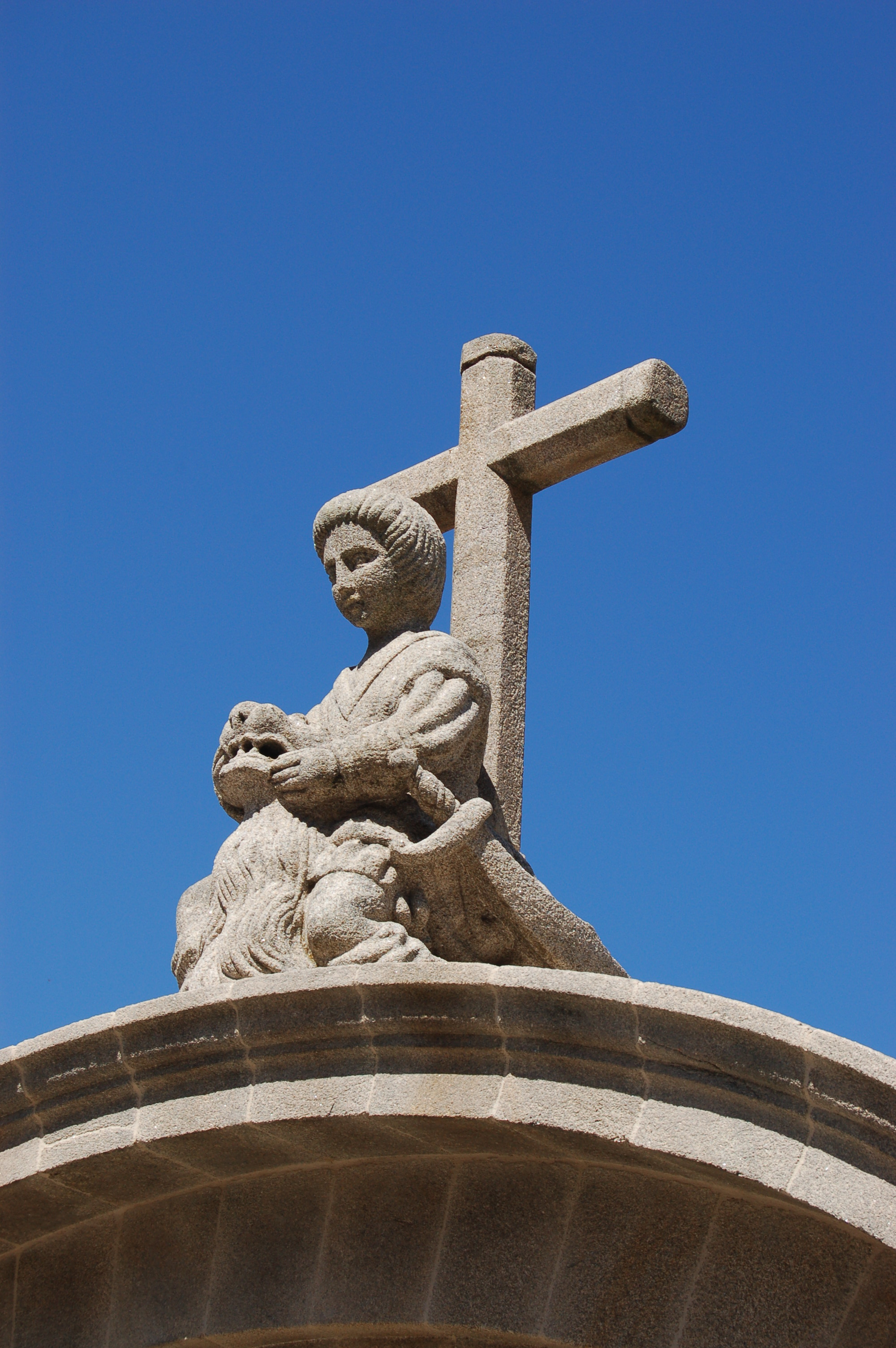 Estatua de Teucro desqueixando ó león de Nemea, adoptando a iconografía de Hércules; está situado no adro da capela da Virxe Peregrina de Pontevedra.